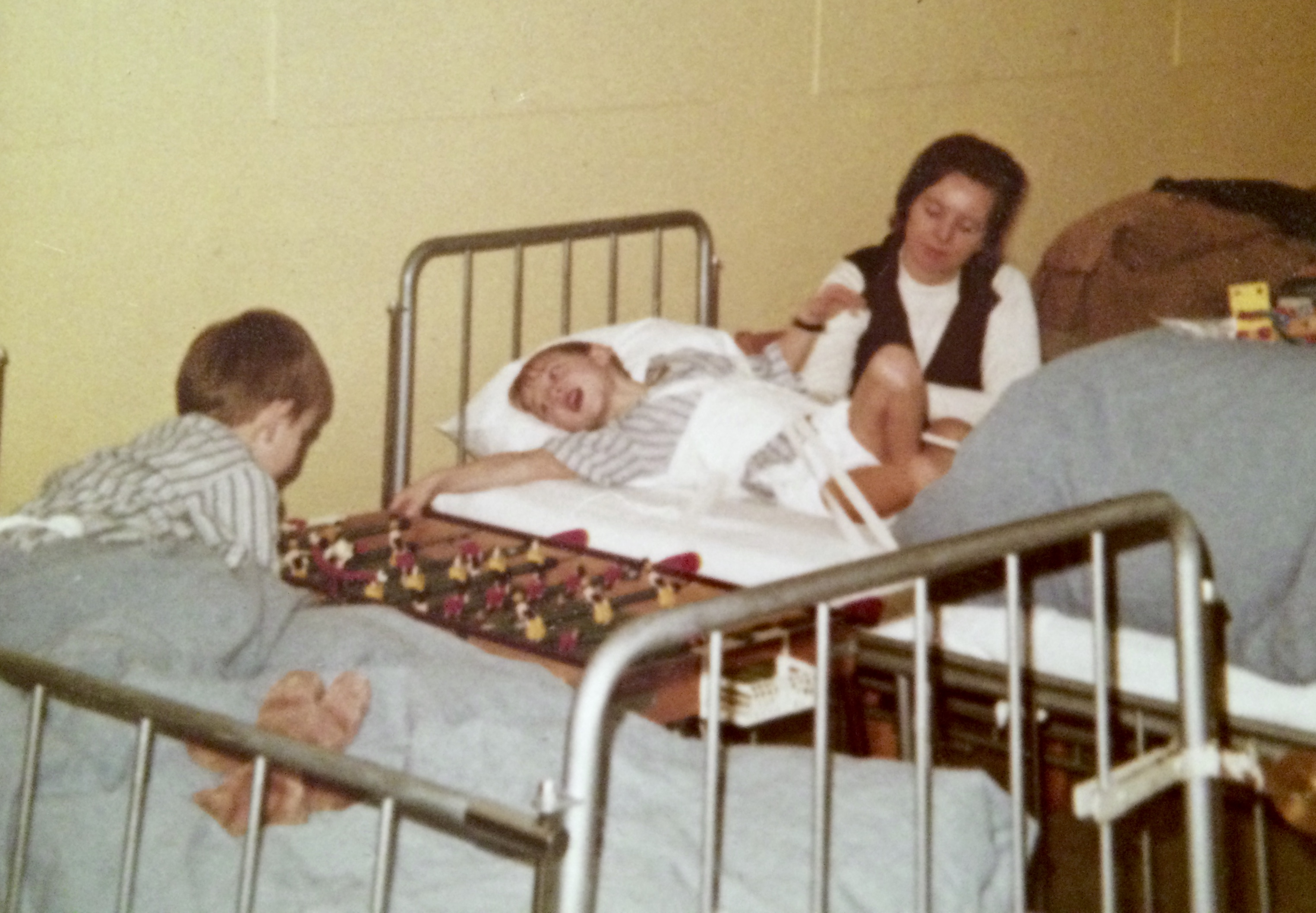 To børn med Calvé-legg-Perthes, og mor i 1972.